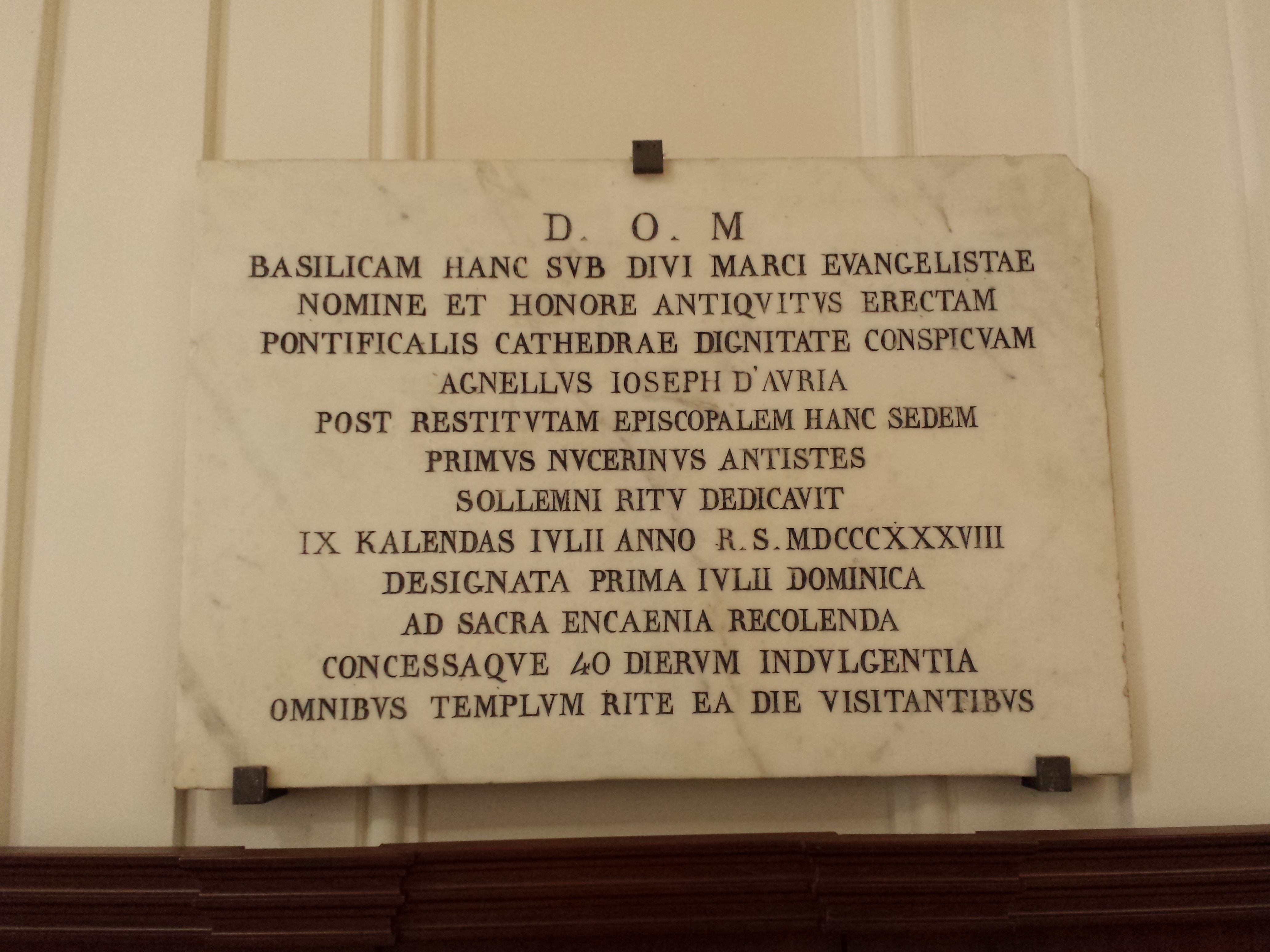 Lapide con dedicazione basilica, cattedrale di Nocera Inferiore